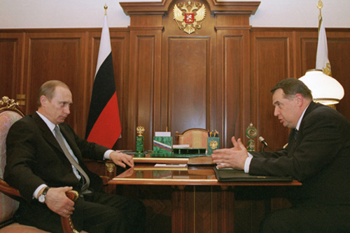 МОСКВА, КРЕМЛЬ. С Министром здравоохранения Юрием Шевченко.